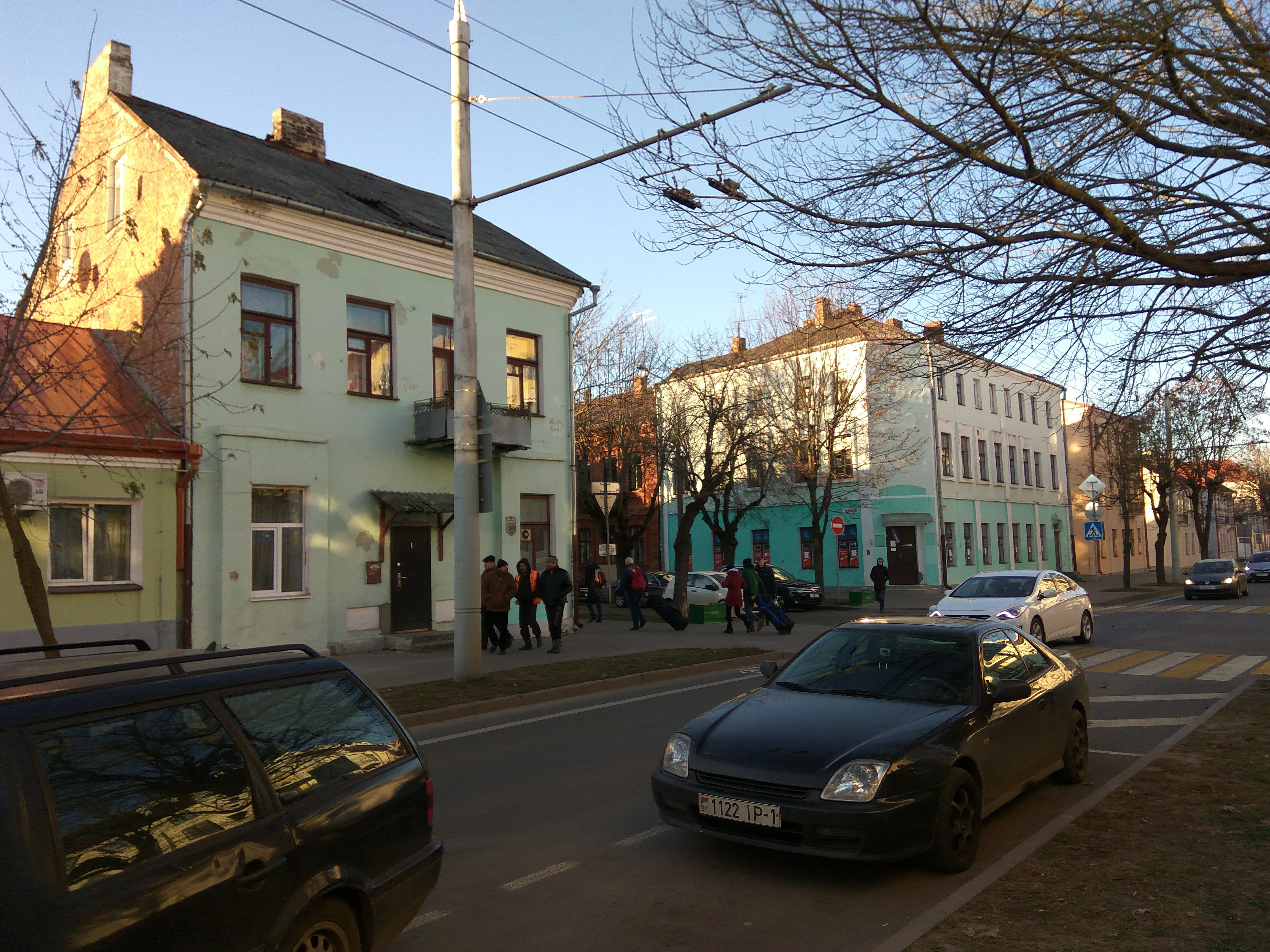 Брэст. Вуліца 17 верасня